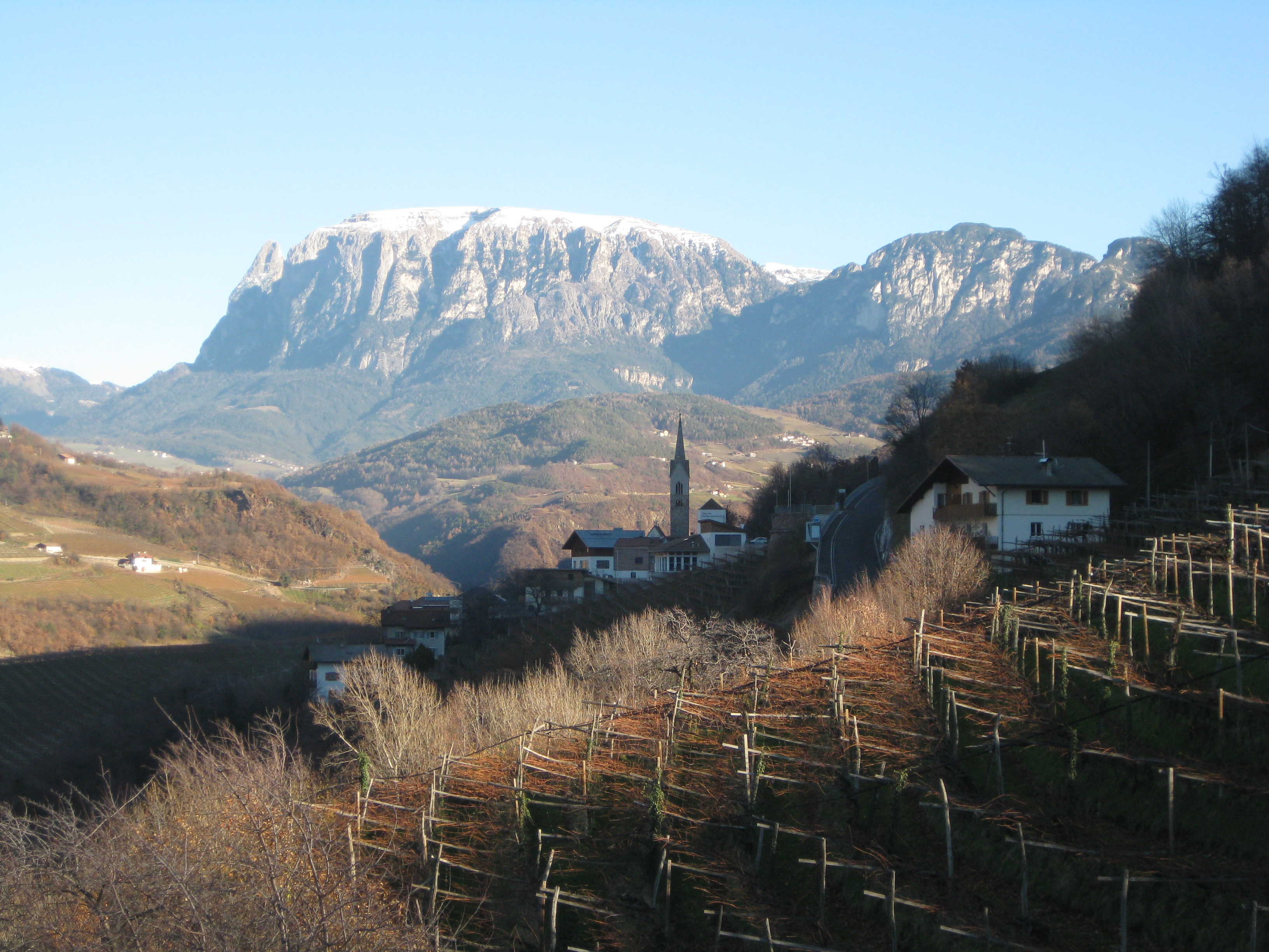 Karneid in Südtirol mit dem Schlern im Hintergrund